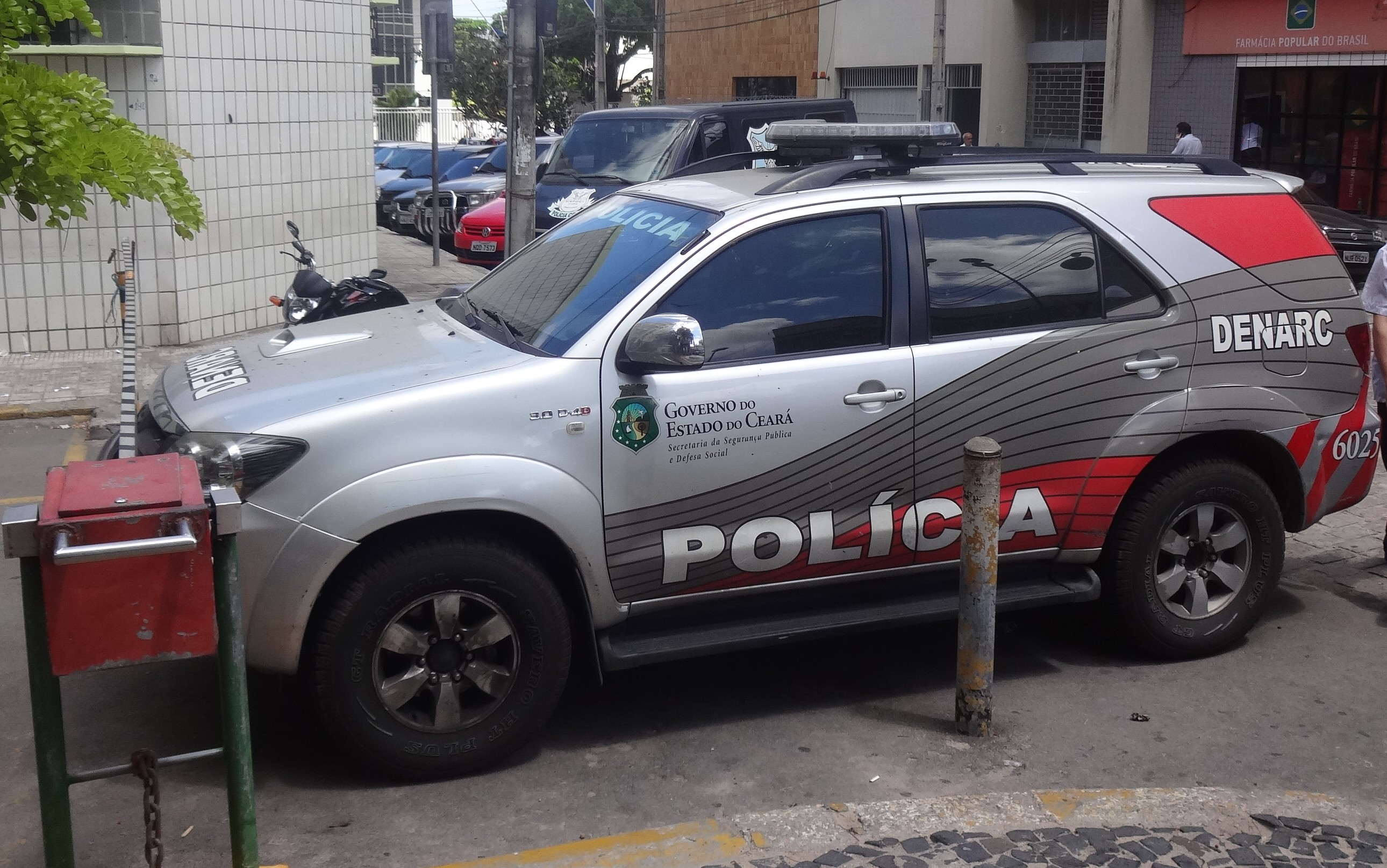 Viatura da Polícia Civil do Estado do Ceará